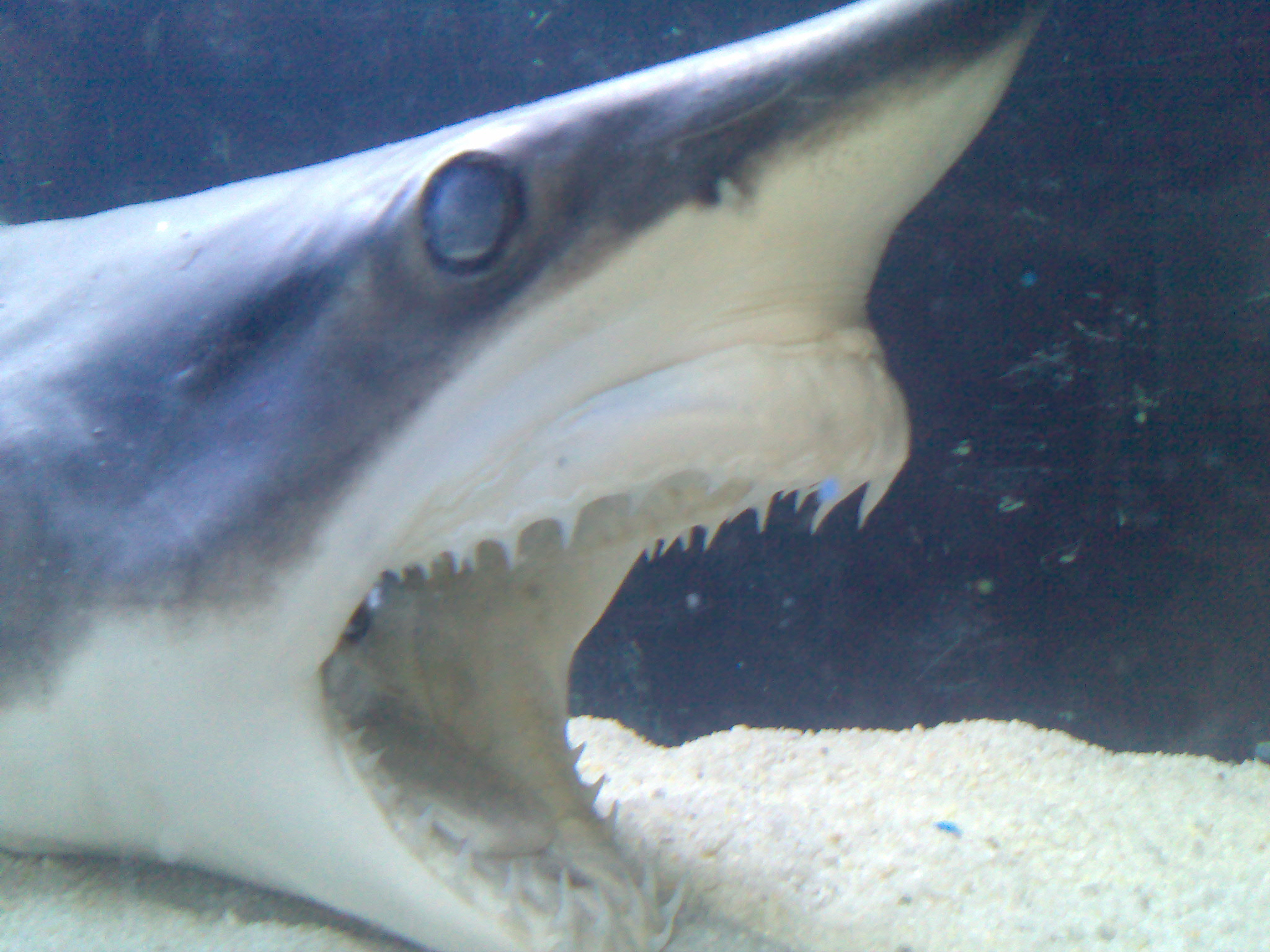 Tubarão em exposição no Museu do Mar, em Ubatuba. Foto de Manoel Lemos, tirada em 31 de dezembro de 2006.